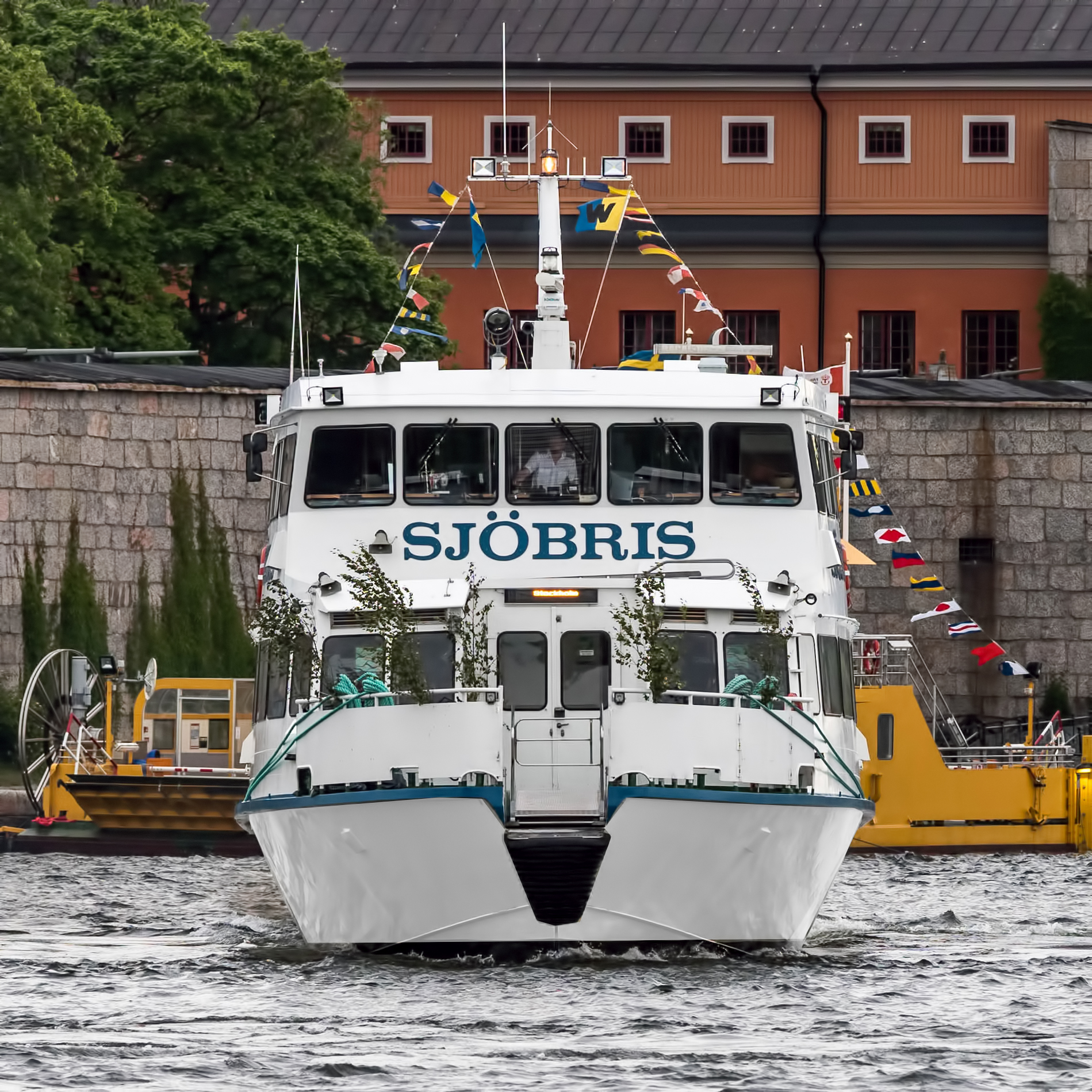 Sjöbris